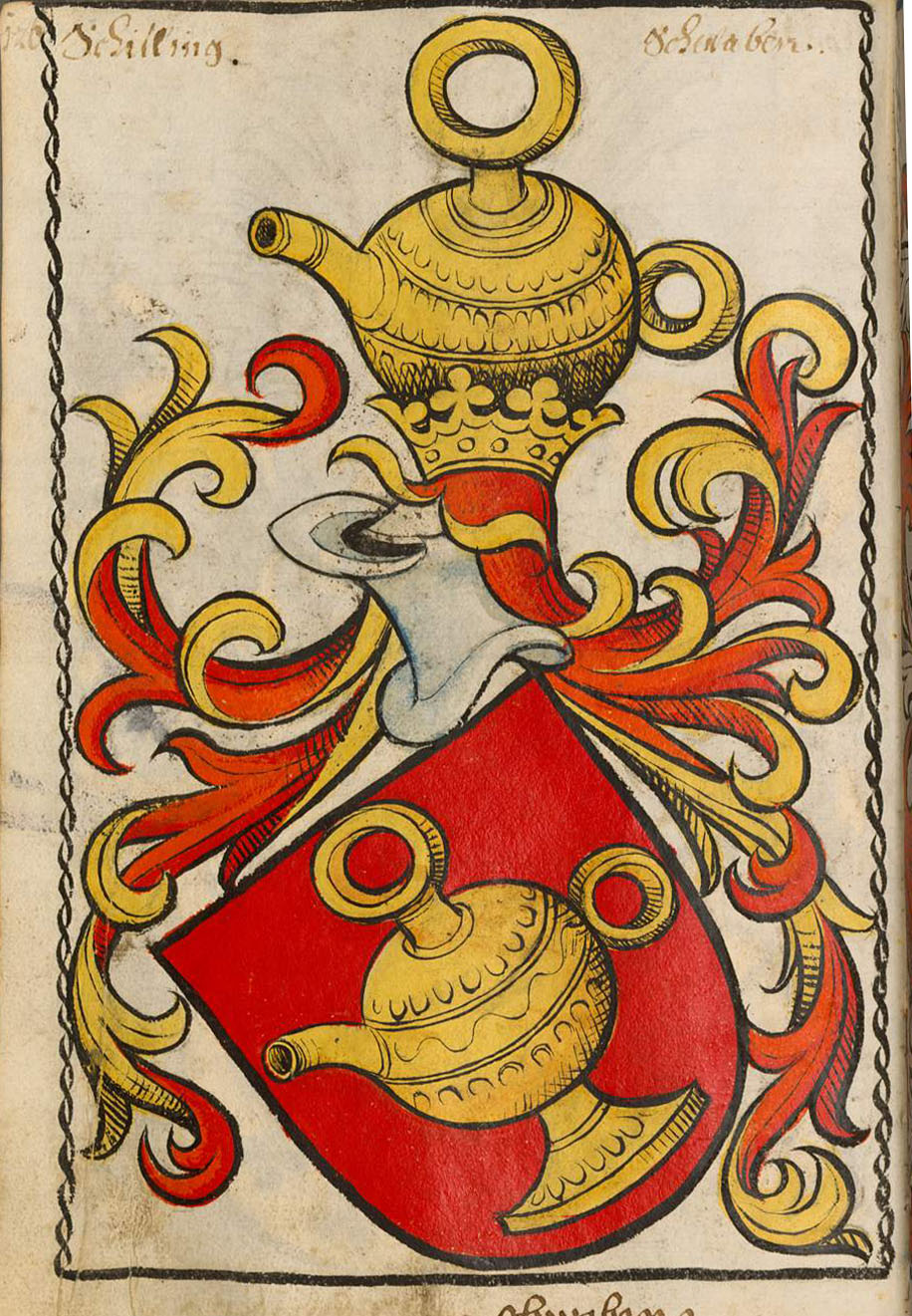 Scheibler'sches Wappenbuch, älterer Teil Wappen der Familie Schilling von Cannstatt.